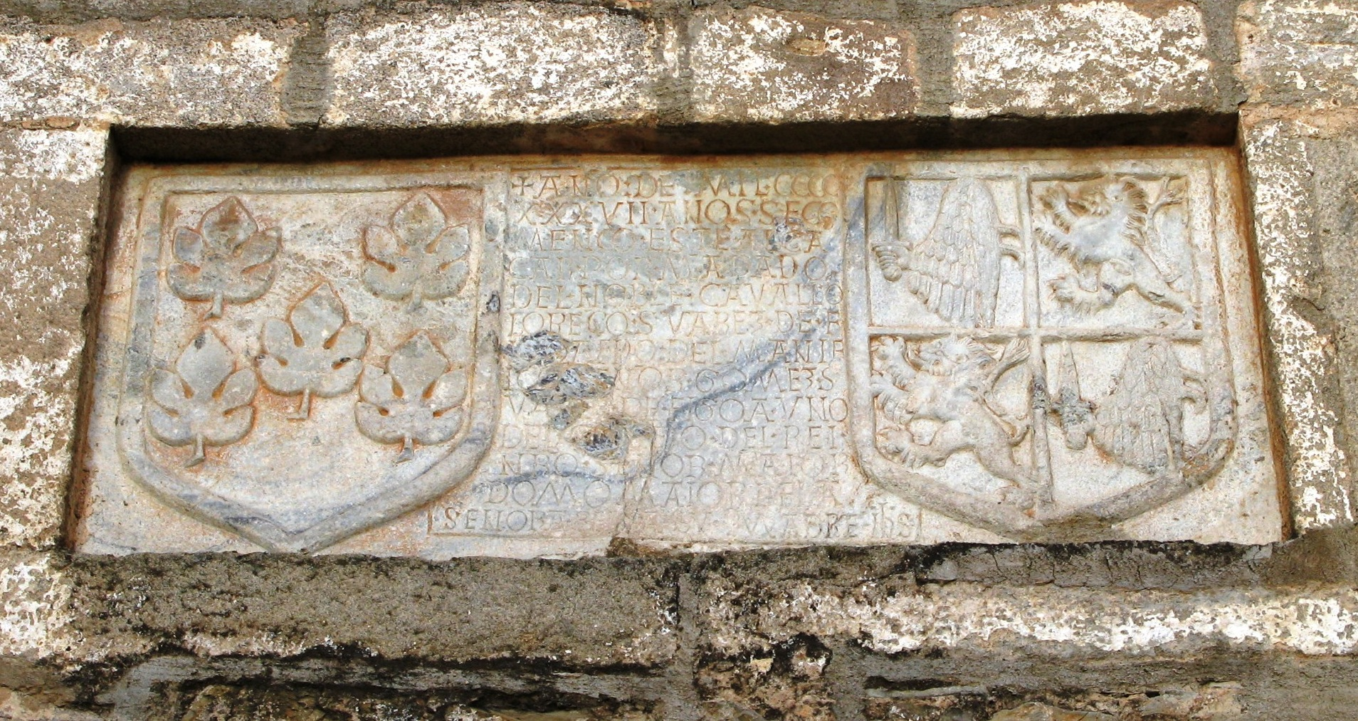 Escudo de armas del I Conde de Feria (Zafra, Badajoz)